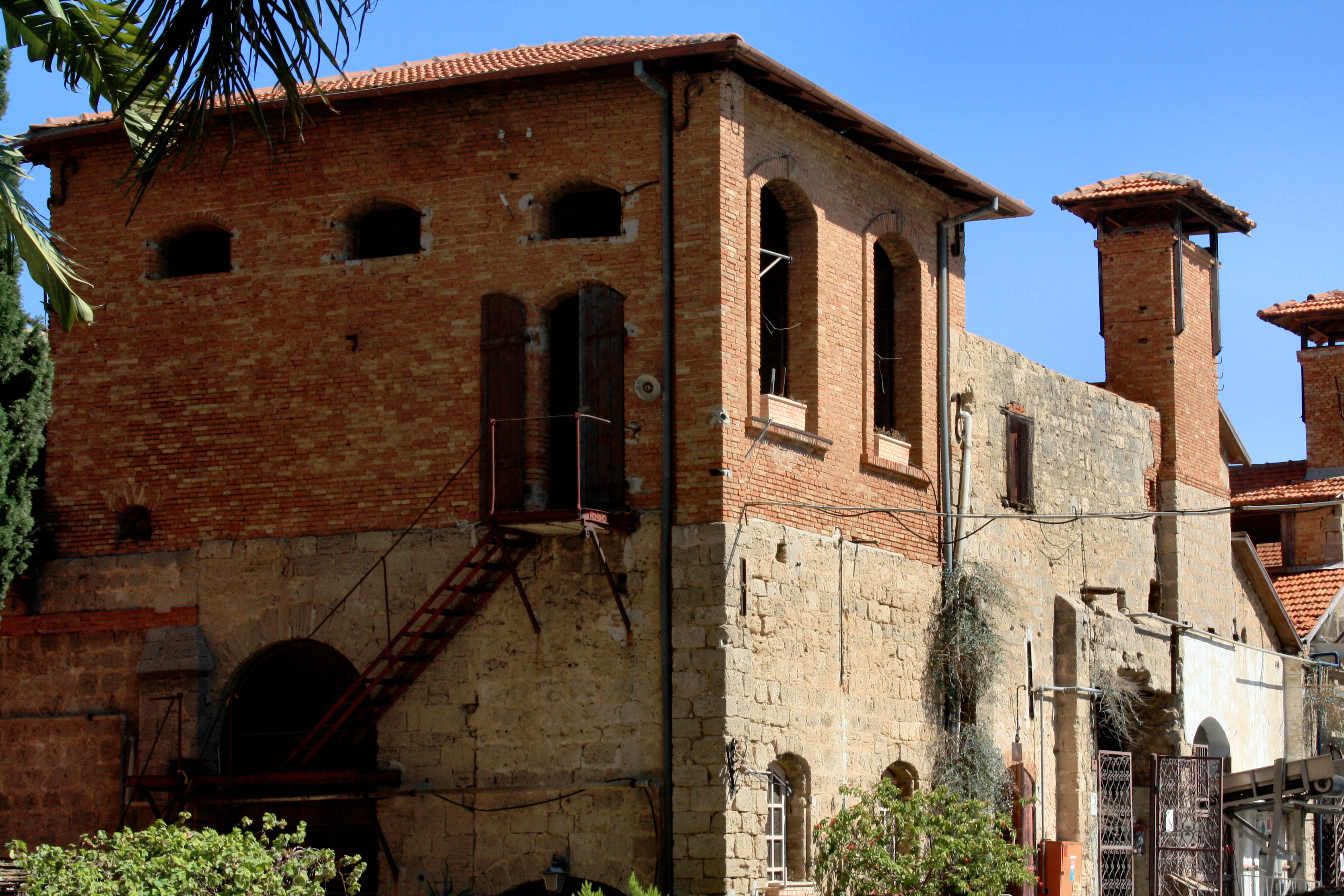 יקבי כרמל הוקמו ב-1890 במושבות ראשון לציון וזכרון יעקב על ידי הברון בנימין אדמונד דה רוטשילד, והם פעילים עד היום.